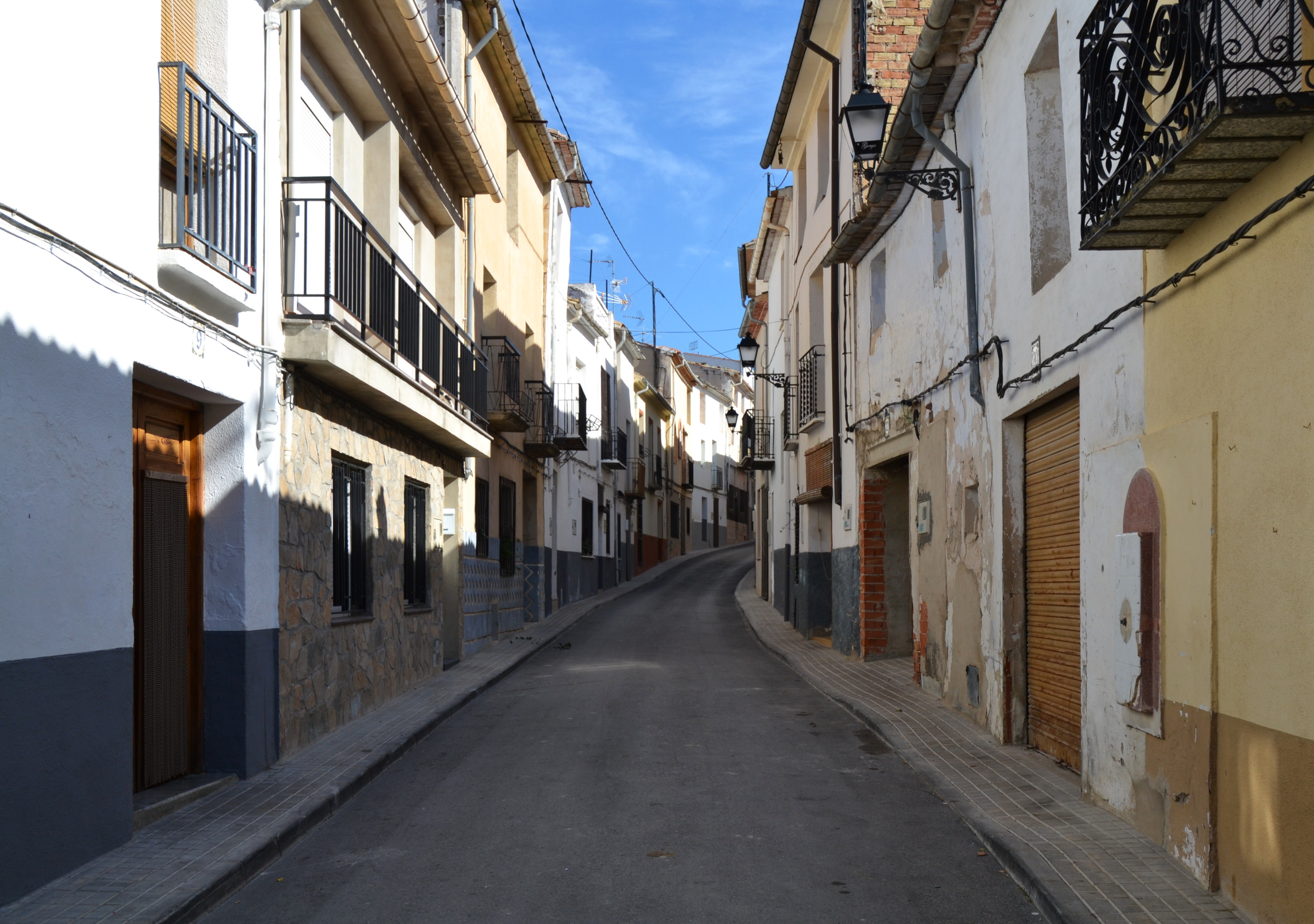 Gorga, carrer Major.